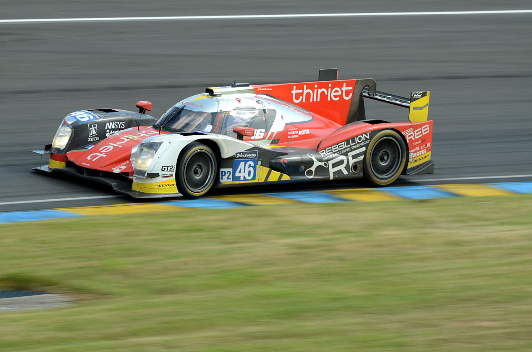 L'Oreca 05 - Nissan de l'écurie Thiriet par TDS Racing pilotée par Pierre Thiriet, Mathias Beche et Ryo Hirakawa lors des 24 Heures du Mans 2016